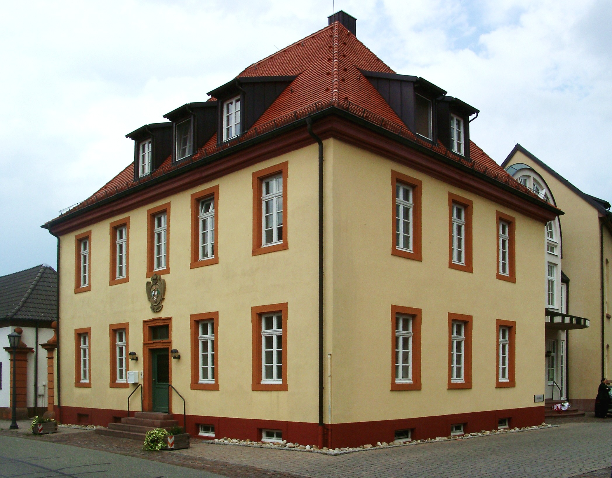 Forst (Baden), Jägerhaus